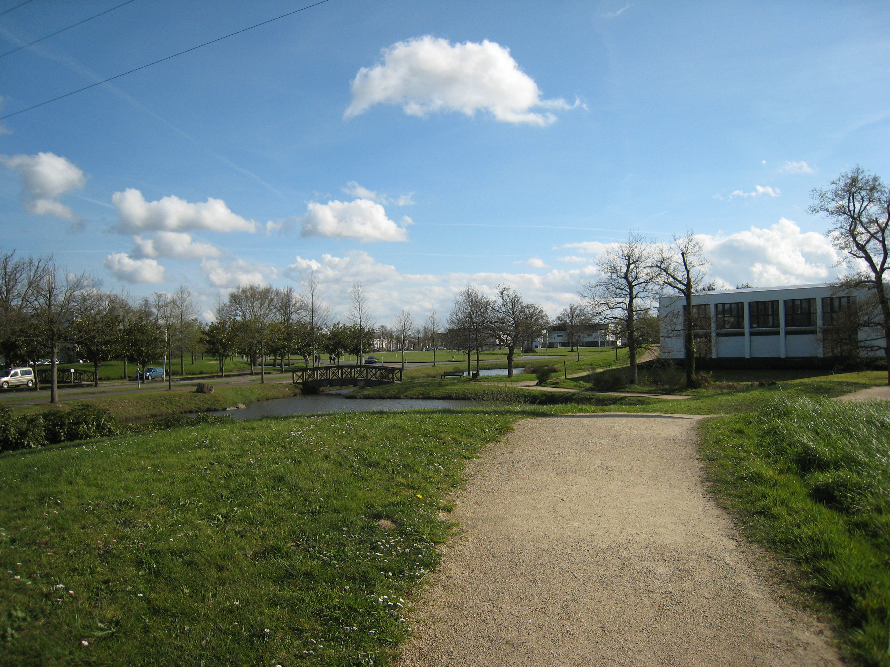 Photo du campus de Ker Lann